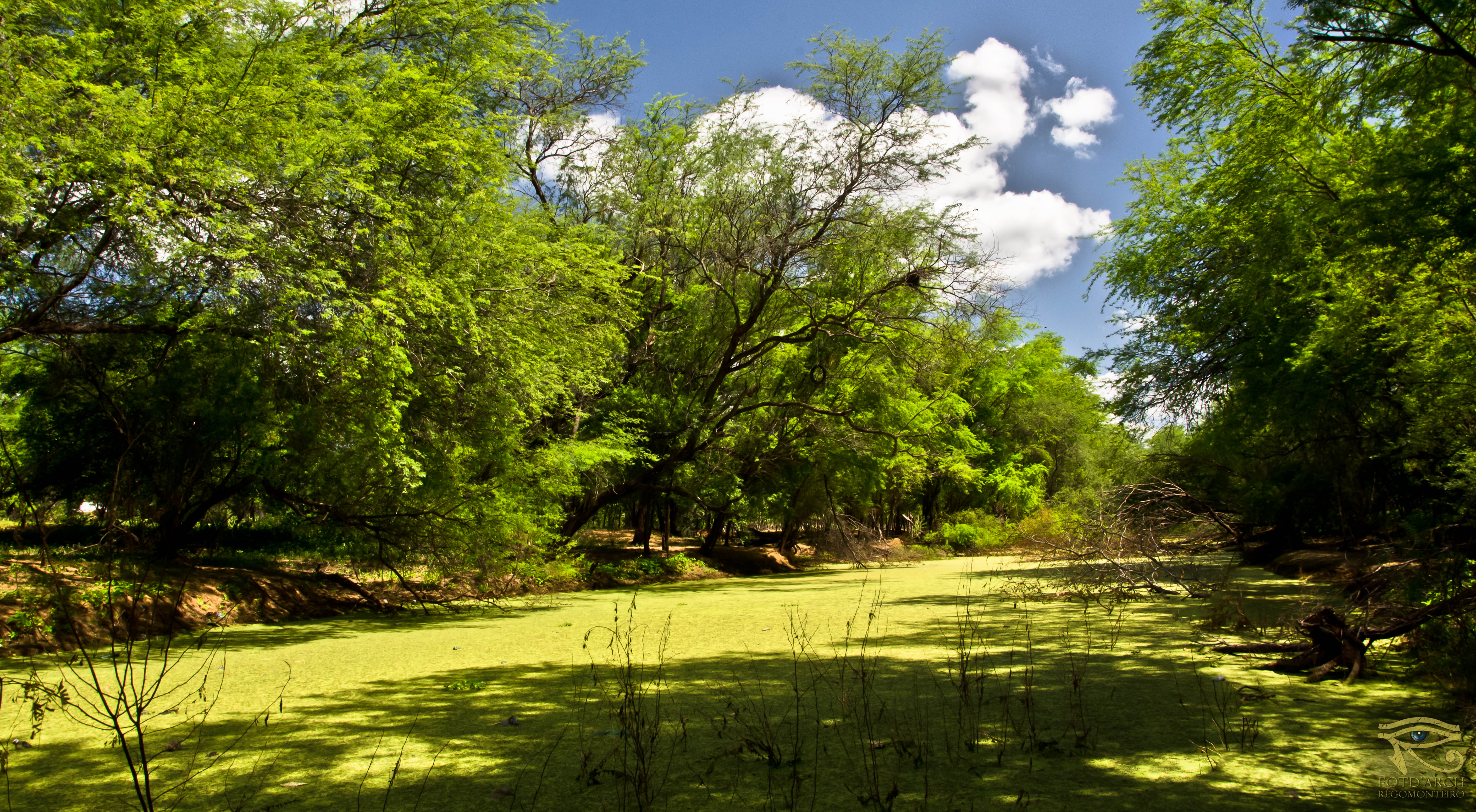 Descrição_para_sua_foto